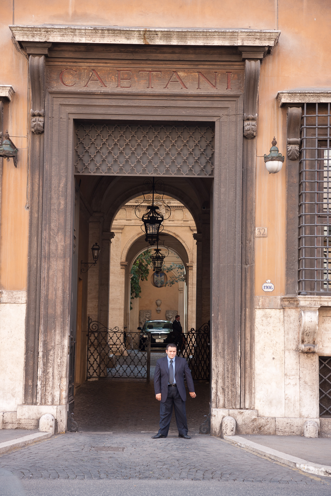 двор